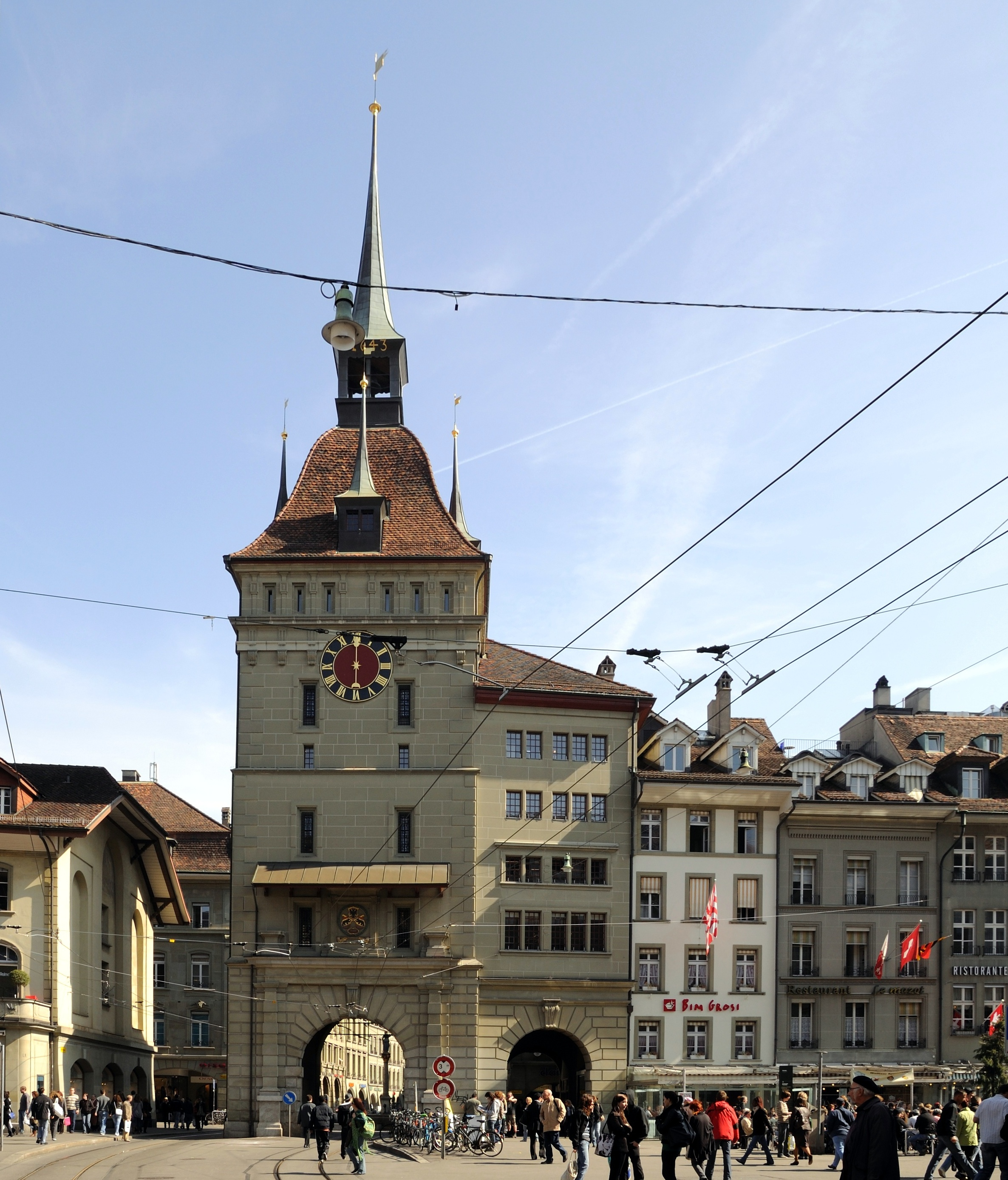 Bern: Käfigturm am Bärenplatz